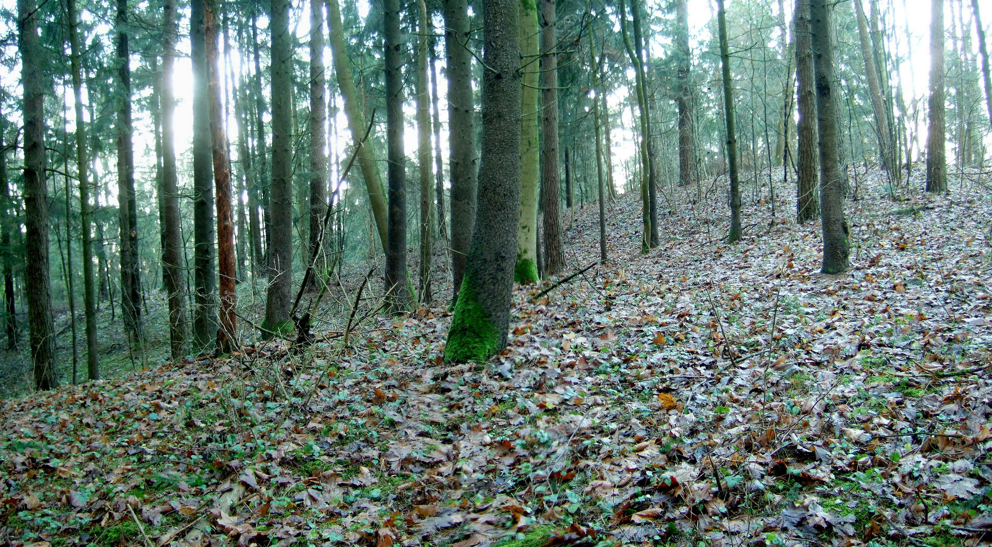 Gariūnų piliakalnio šiaurvakarinis šlaitas